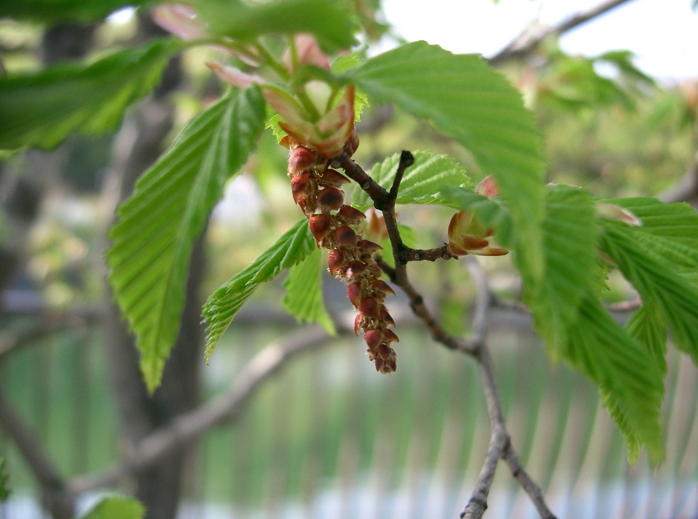 Carpinus tschonoskii